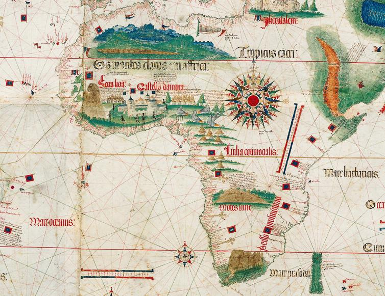 Africa in Cantino map (1502).